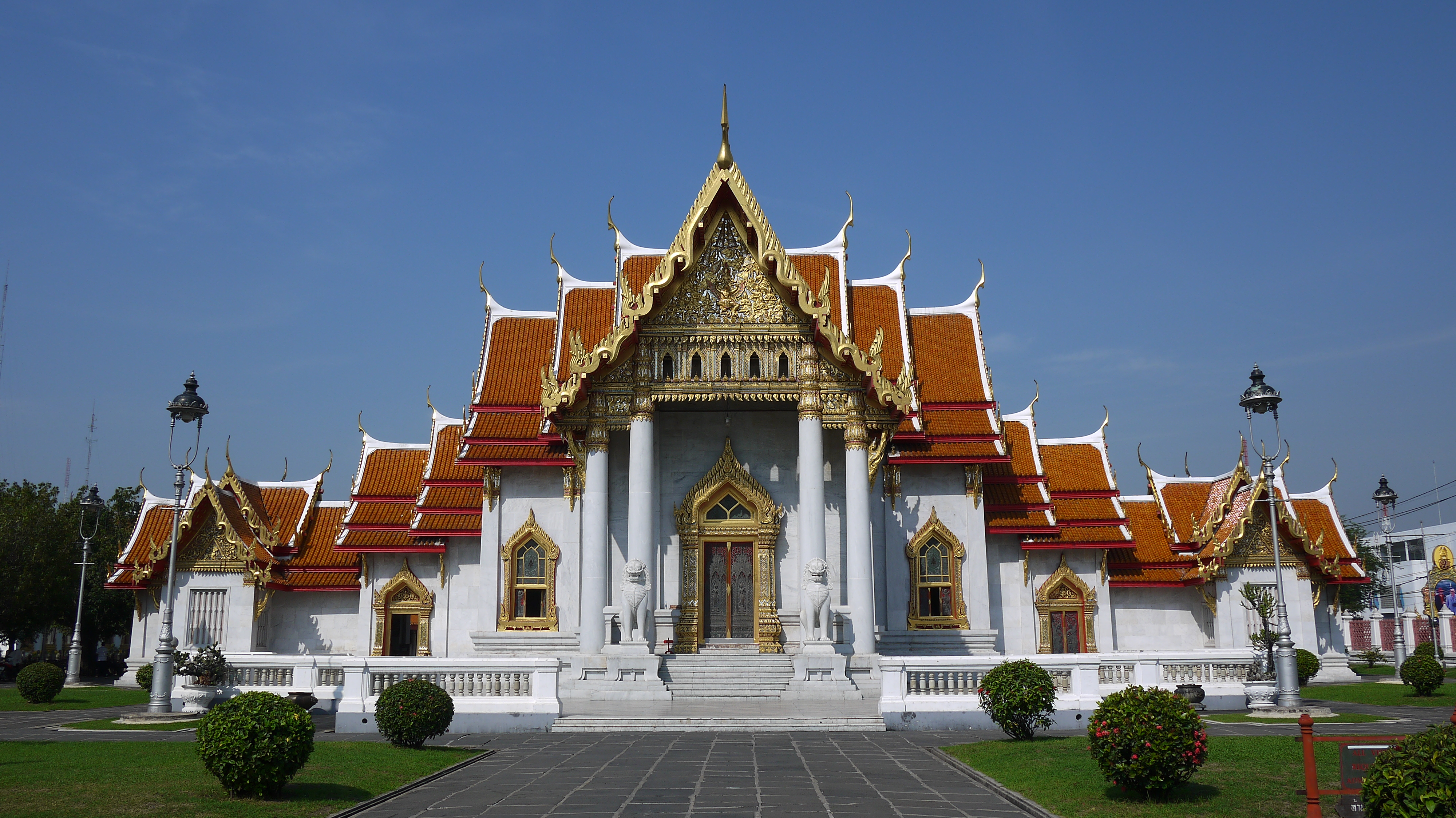 วัดเบญจมบพิตรดุสิตวนารามราชวรวิหาร [Thai Marble Temple - Wat Benchamabophit]